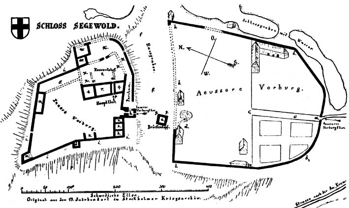 Plaan 1680ndatest aastatest. Löwis of Menari koopia plaanist Rootsi Sõjaarhiivis.